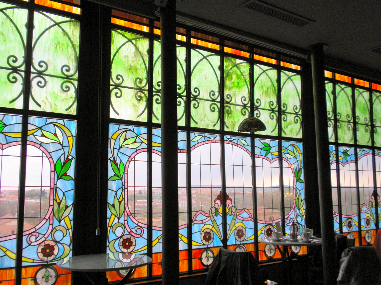 Foto hecha en el interior de la cafetería de la Casa Lis de Salamanca